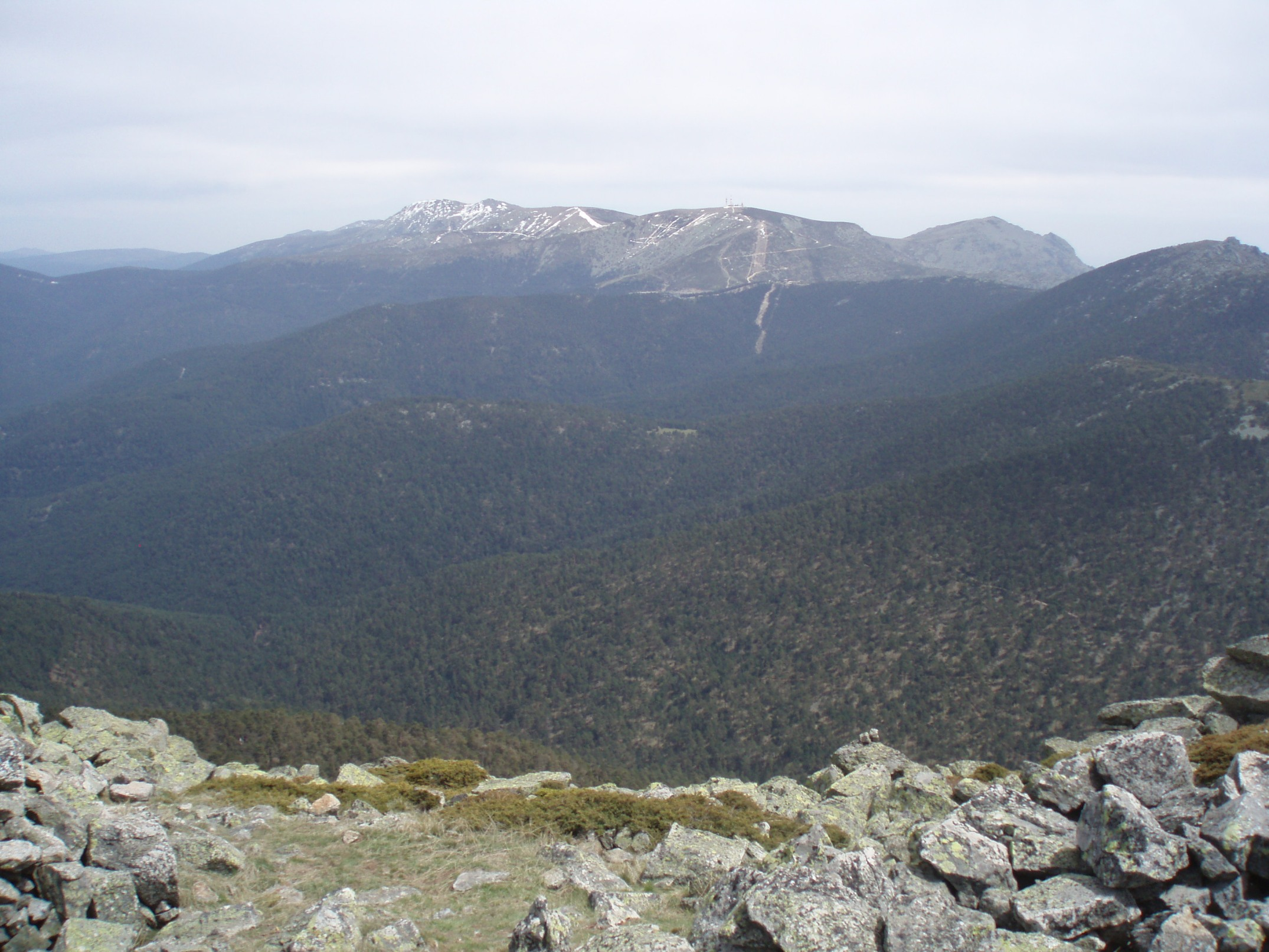 Cabezas de Hierro, Bola del Mundo, La Maliciosa y el extremo este de Siete Picos desde la cima de Montón de Trigo (Sierra de Guadarrama, España).